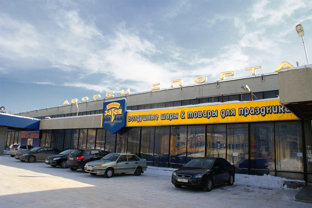 Дворец спорта Авиакор (Дворец легкой атлетики) Адрес: Самара, улица Физкультурная, 101